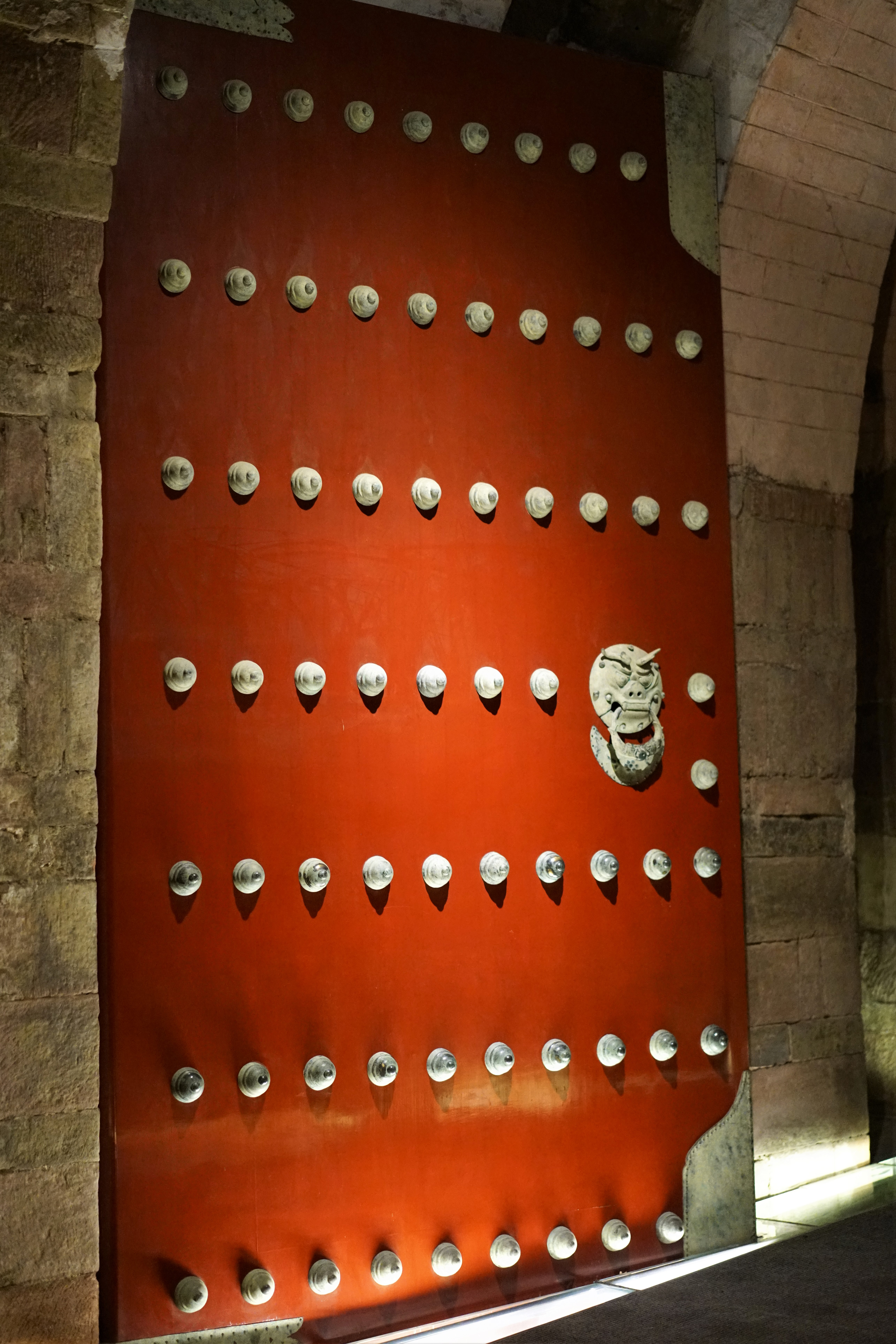 中文（中国大陆）: 王建墓墓门